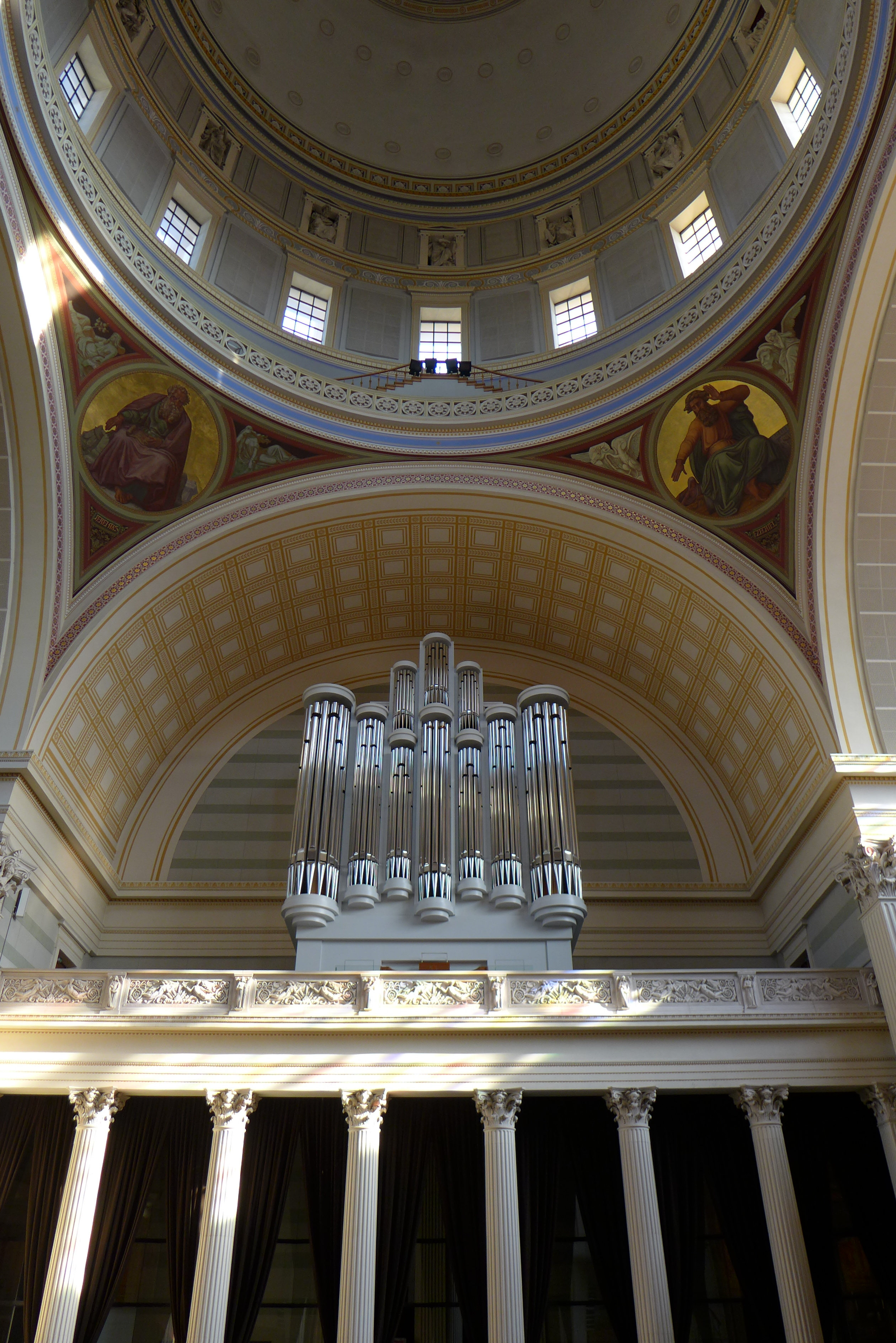 St. Nikolaikirche (Potsdam), Orgelempore